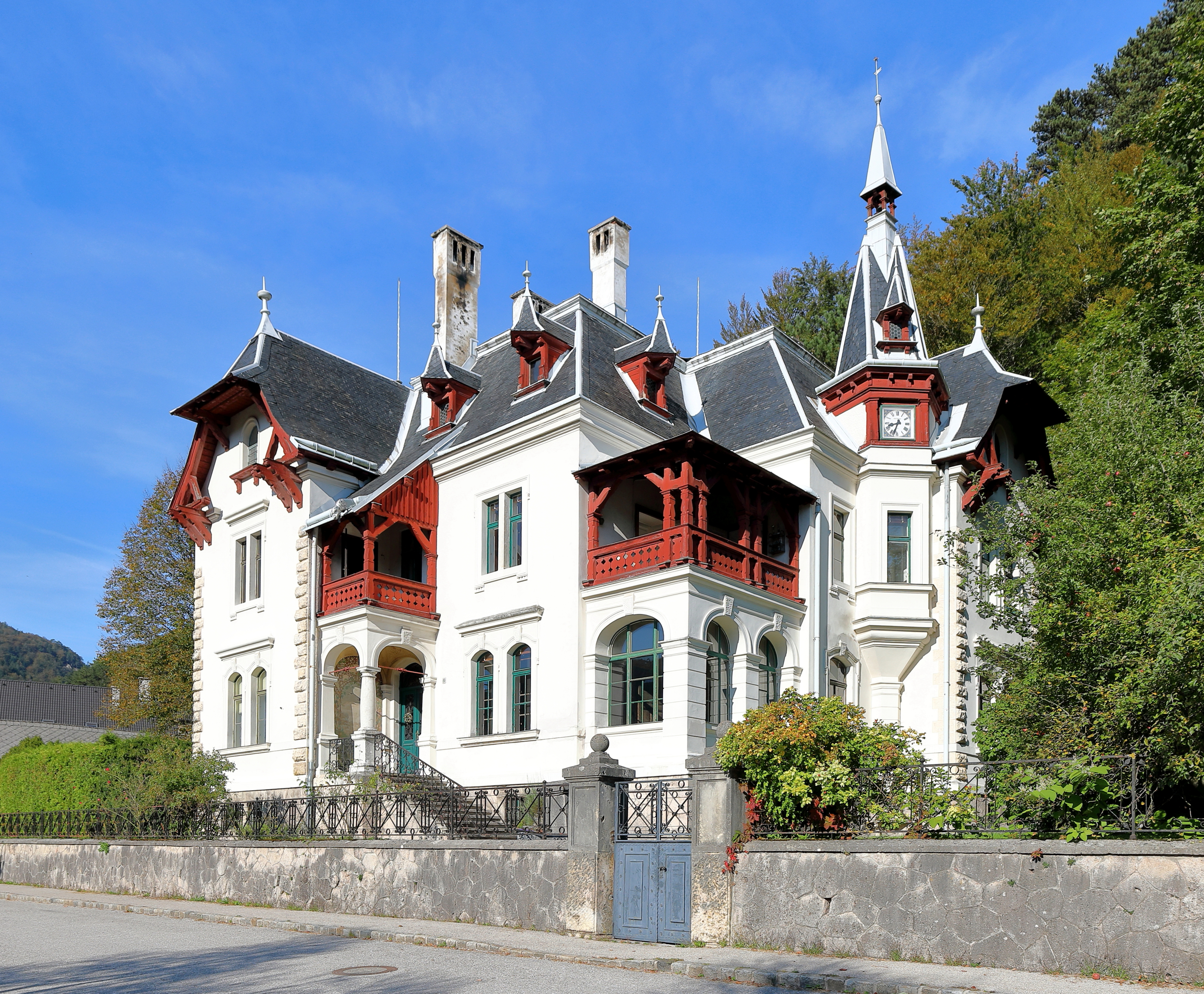 Südostansicht der Villa Trebesiner in der niederösterreichischen Marktgemeinde Gutenstein..Die späthistoristische Villa mit Elementen des sogenannten Schweizerhausstils unter reicher Dachlandschaft wurde 1889 bis 1890 nach Plänen von Julius Deininger für den Notar Joseph Trebesiner als Wohn- und Kanzleigebäude erbaut.